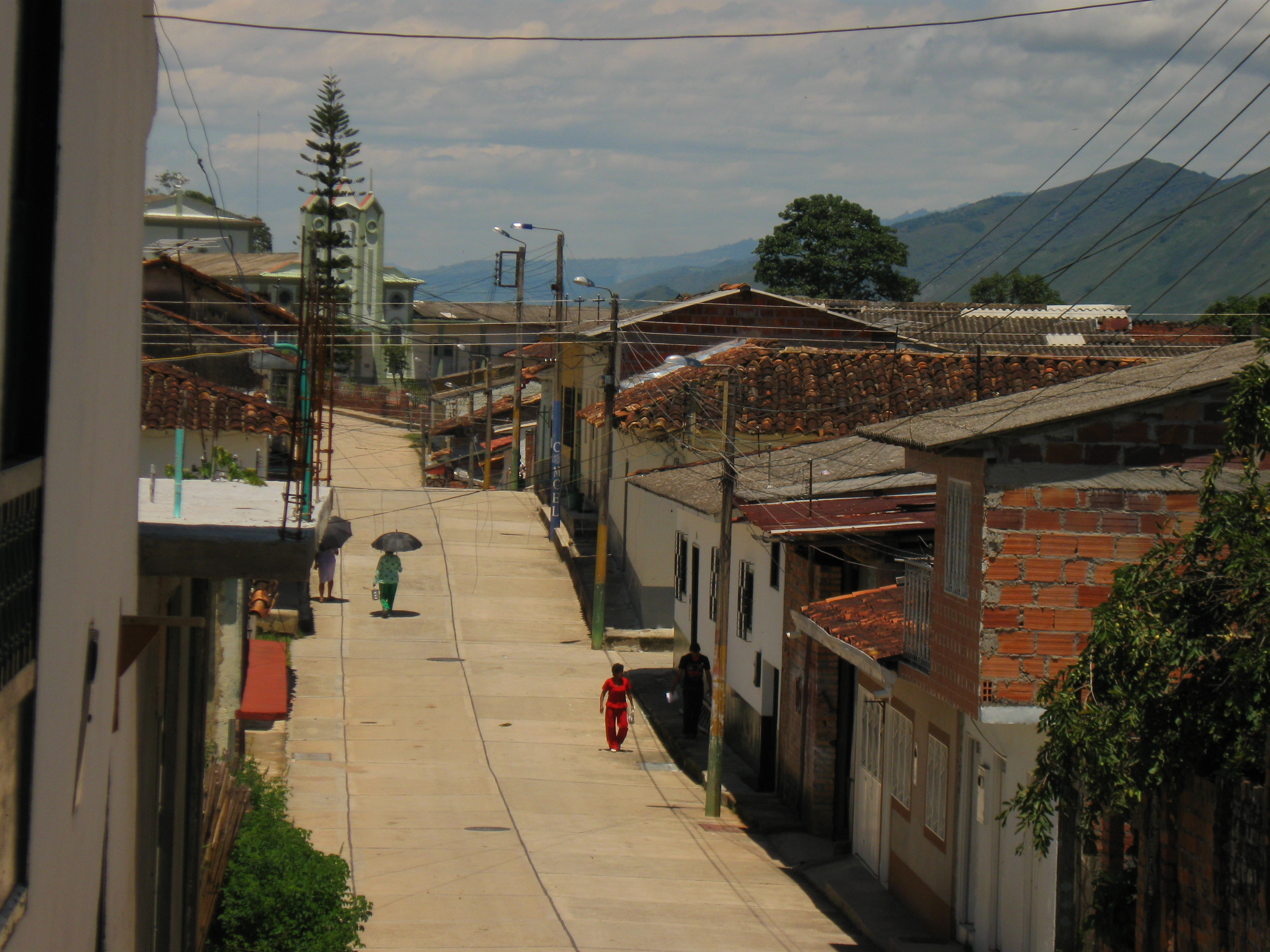 Guadalupe, Santander